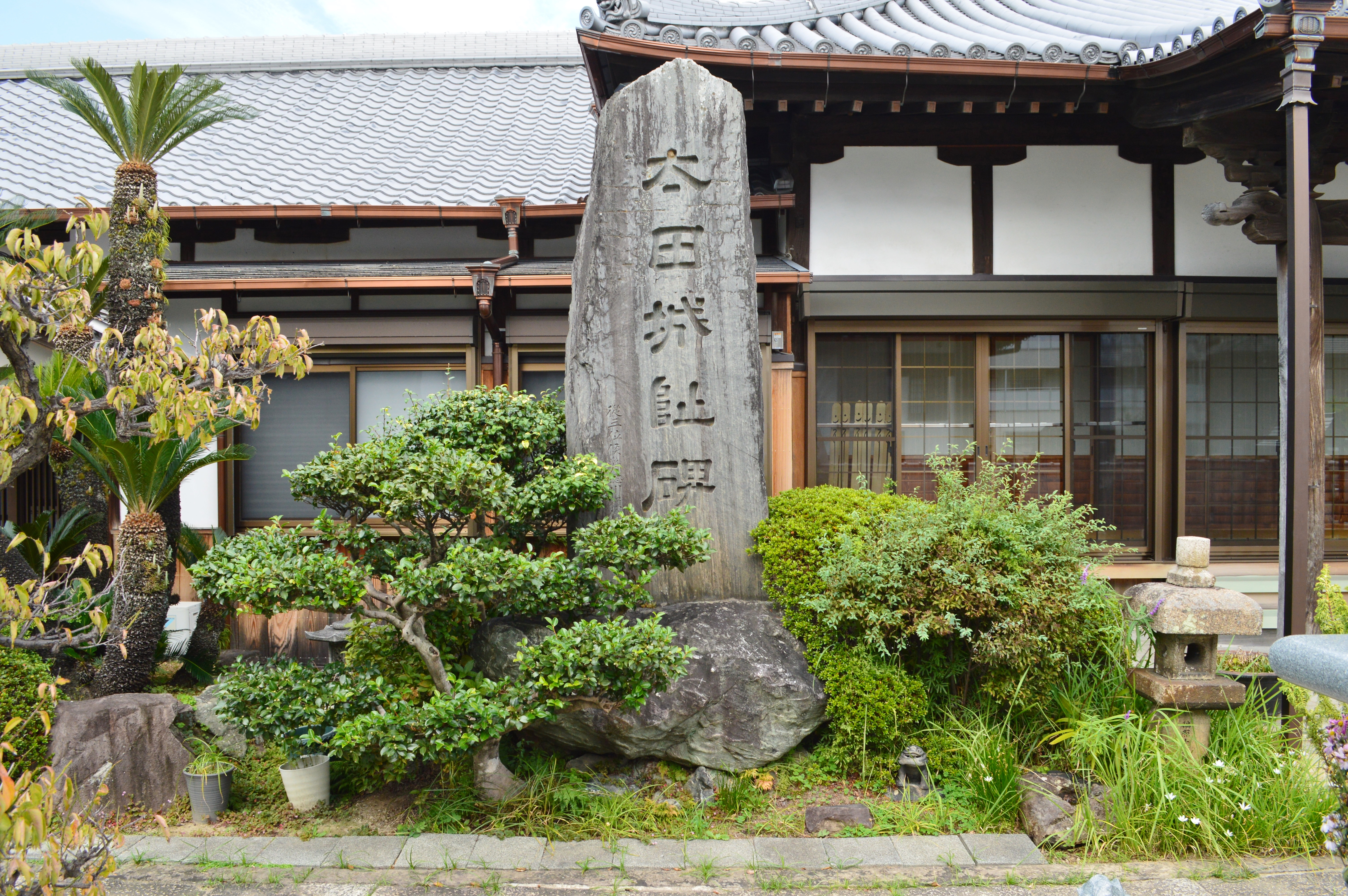 太田城 (紀伊国) 石碑